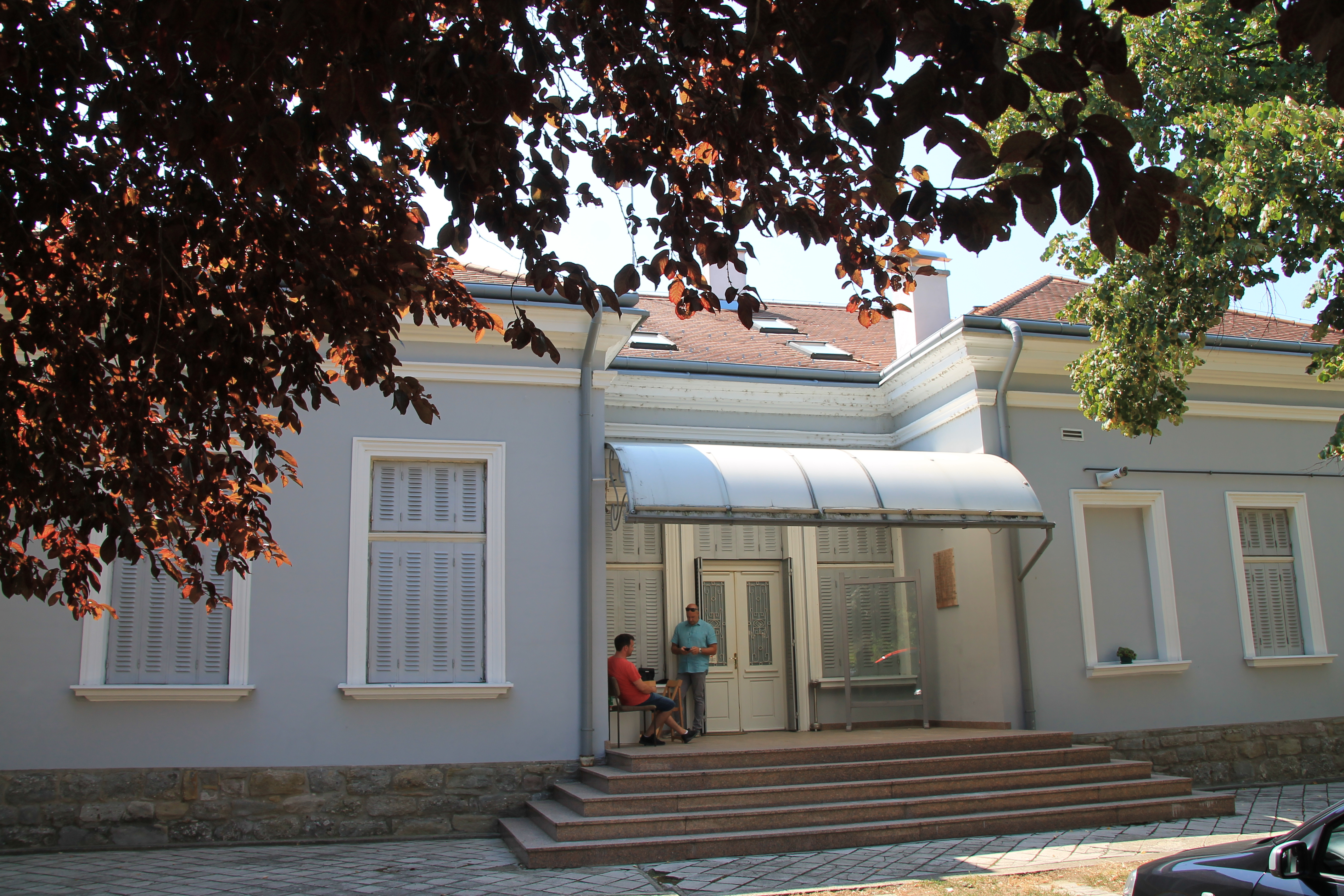 Zgrada galerije Nadežda Petrović